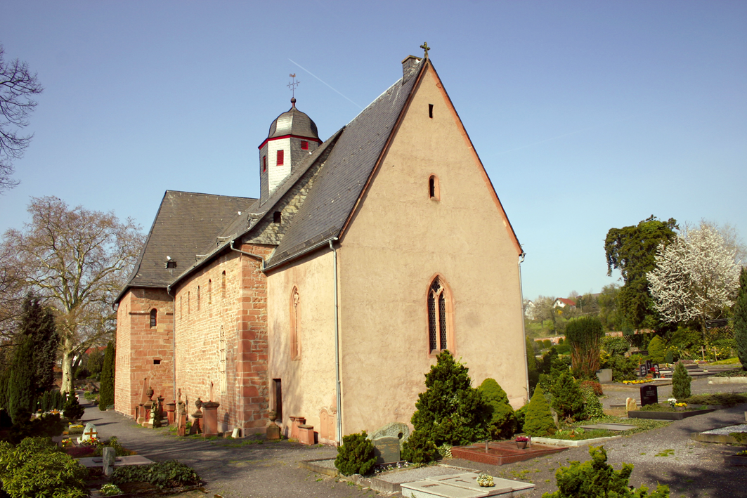 St.-Remigius-Kirche in Büdingen